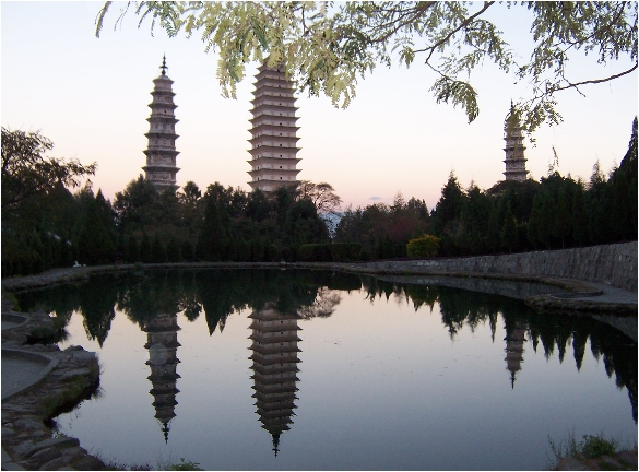 内容介绍：大理三塔 原创者：zhuwq 创作日期：2004年12月（黄昏） 创作方法：旅游时自拍的